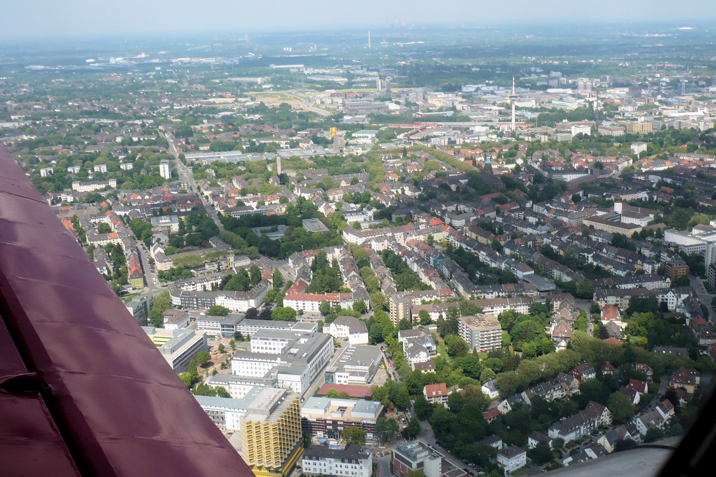 Luftbild von Essen-Holsterhausen